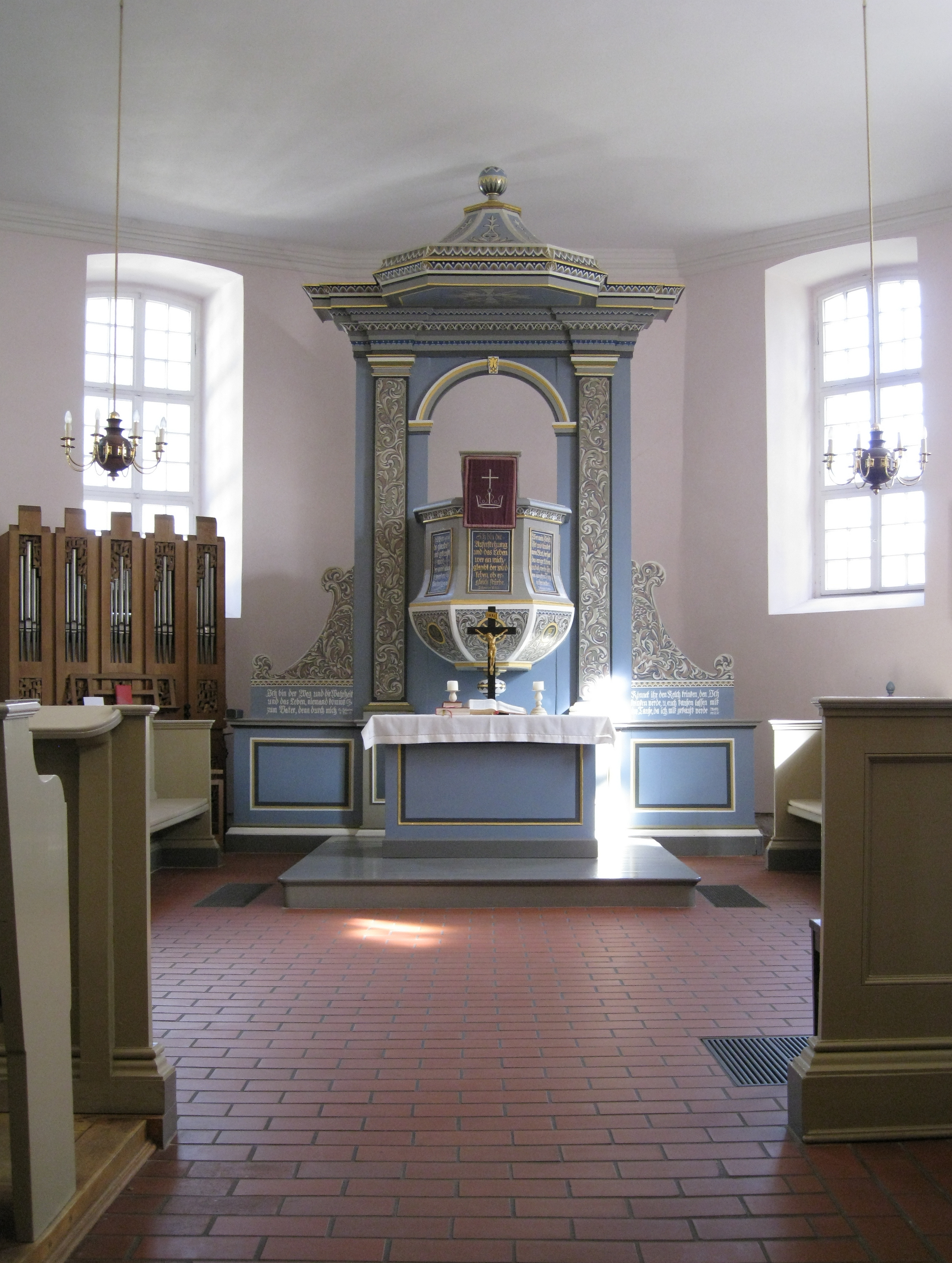 Innenraum der Dorfkirche Heiligensee, fotografiert von Außen durch die geöffneten Türen